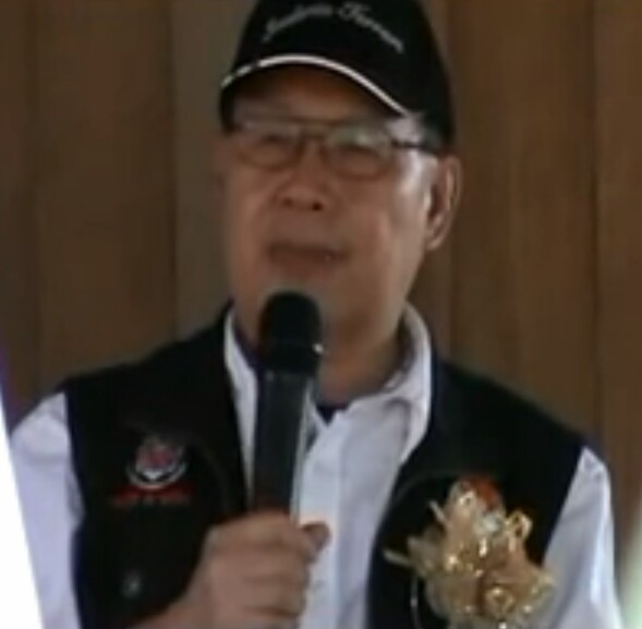 Ucapan Dr Jeffrey di Dun Kemabong..